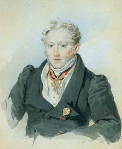 П.Ф.Соколов. Портрет тайного советника А.И.Блока, прадеда поэта. 1829. Бумага, акварель. ГЛМ